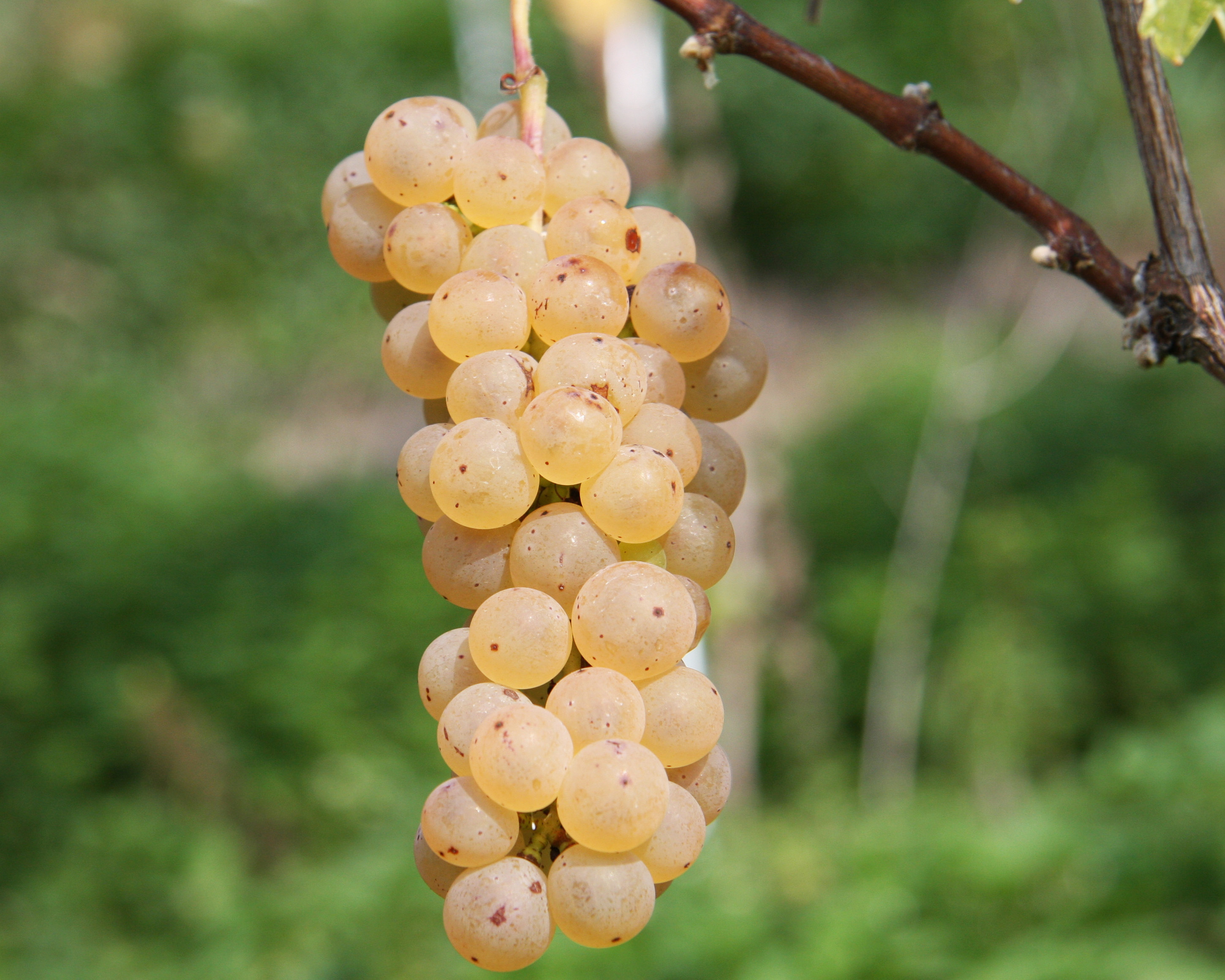 Blätter und reife Traube der weißen Rebsorte Johanniter